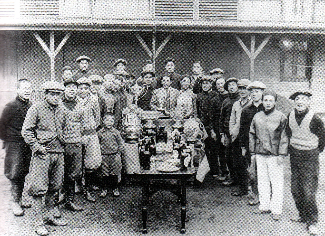 カブトヤマ東京優駿（日本ダービー）優勝祝勝会の様子